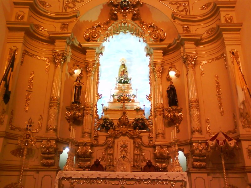 Altar Basílica Menor de Nossa Senhora das Dores. Boa Esperança (Minas Gerais), Brazil